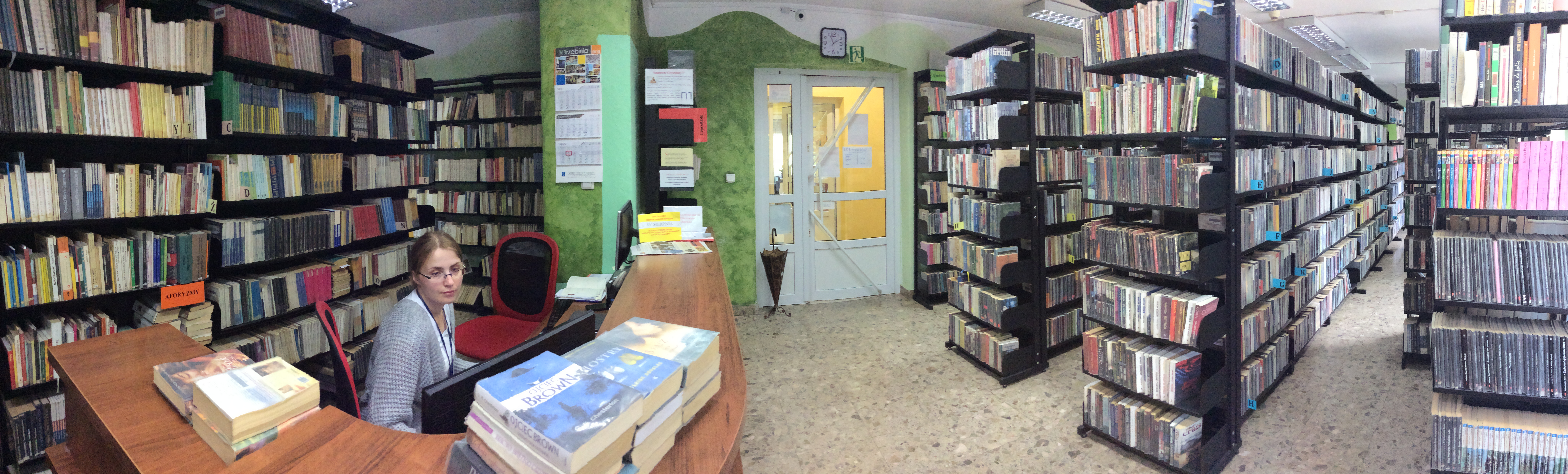 aktualizacja zdjęcia